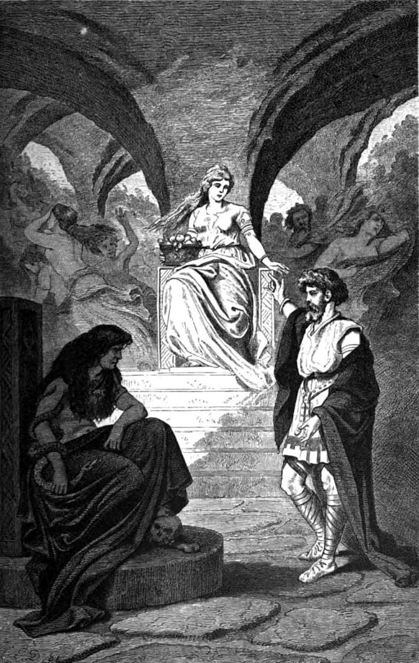 Heimdal verlangt die Rückkehr Iduns aus der Unterwelt. Heimdallr desires Iðunn's return from the underworld. Compare with Hrafnagaldr Óðins.